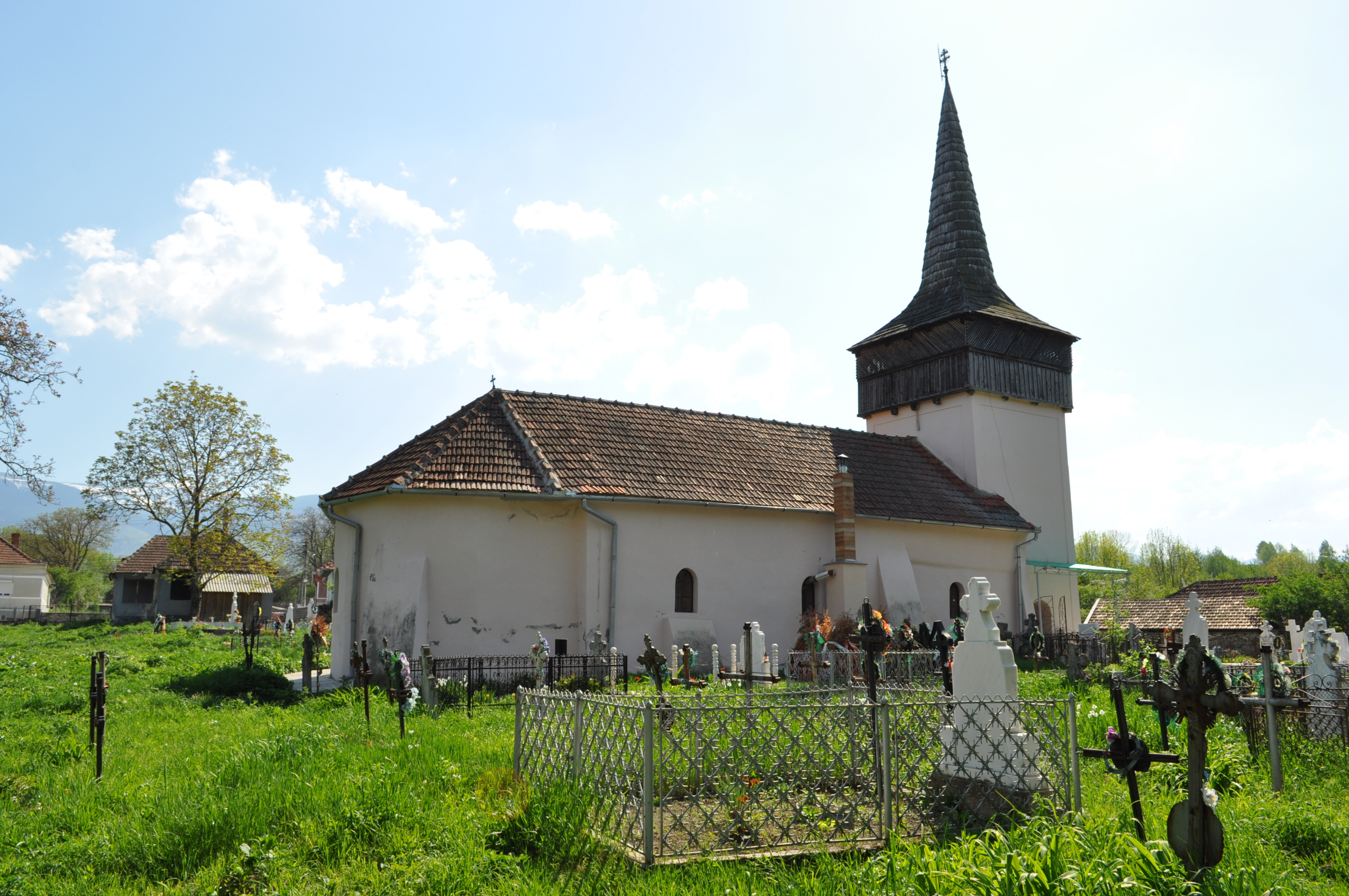 Biserica "Pogorârea Sf. Duh", sat PAROŞ; comuna SĂLAŞU DE SUS